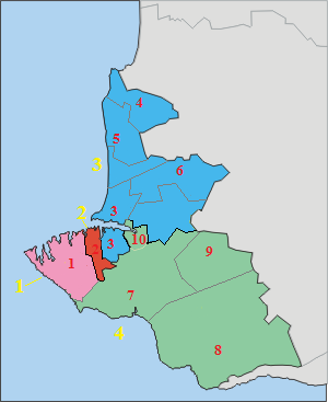 Районы Севастополя (жёлтым) & Внутригородские муниципальные образования (красным): 1. Гагаринский район (1. Гагаринский округ); 2. Ленинский район (2. Ленинский округ); 3. Нахимовский район (3. Нахимовский округ; 4. Андреевский округ; 5. Качинский округ; 6. Верхнесадовский округ). 4. Балаклавский район (7. Балаклавский округ; 8. Орлиновский округ; 9. Терновский округ; 10. город Инкерман).